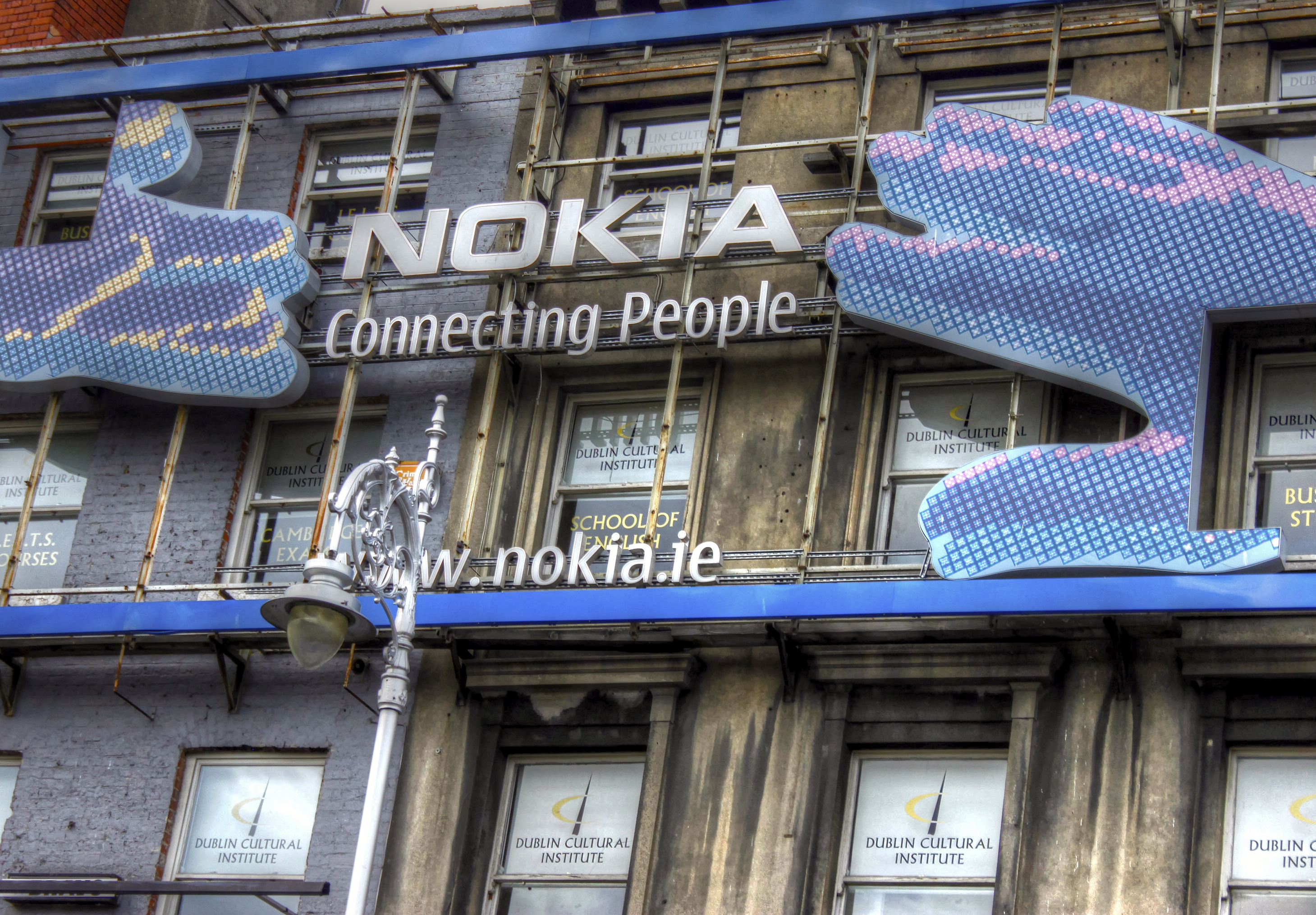 nokia